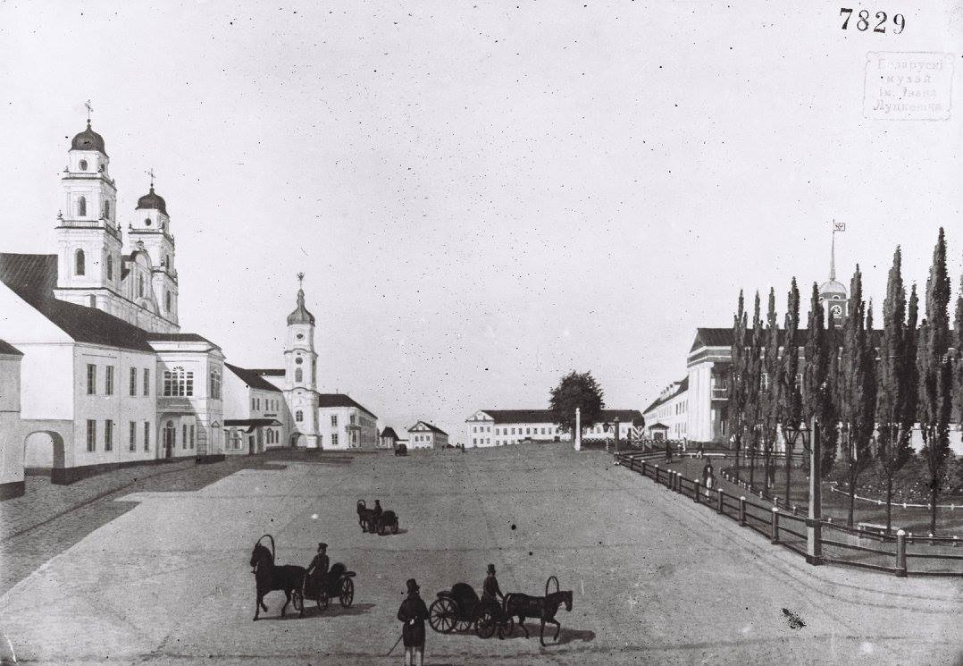 Беларуская (тарашкевіца): Менск (Miensk), пляц Высокі Рынак (plac Vysoki Rynak)